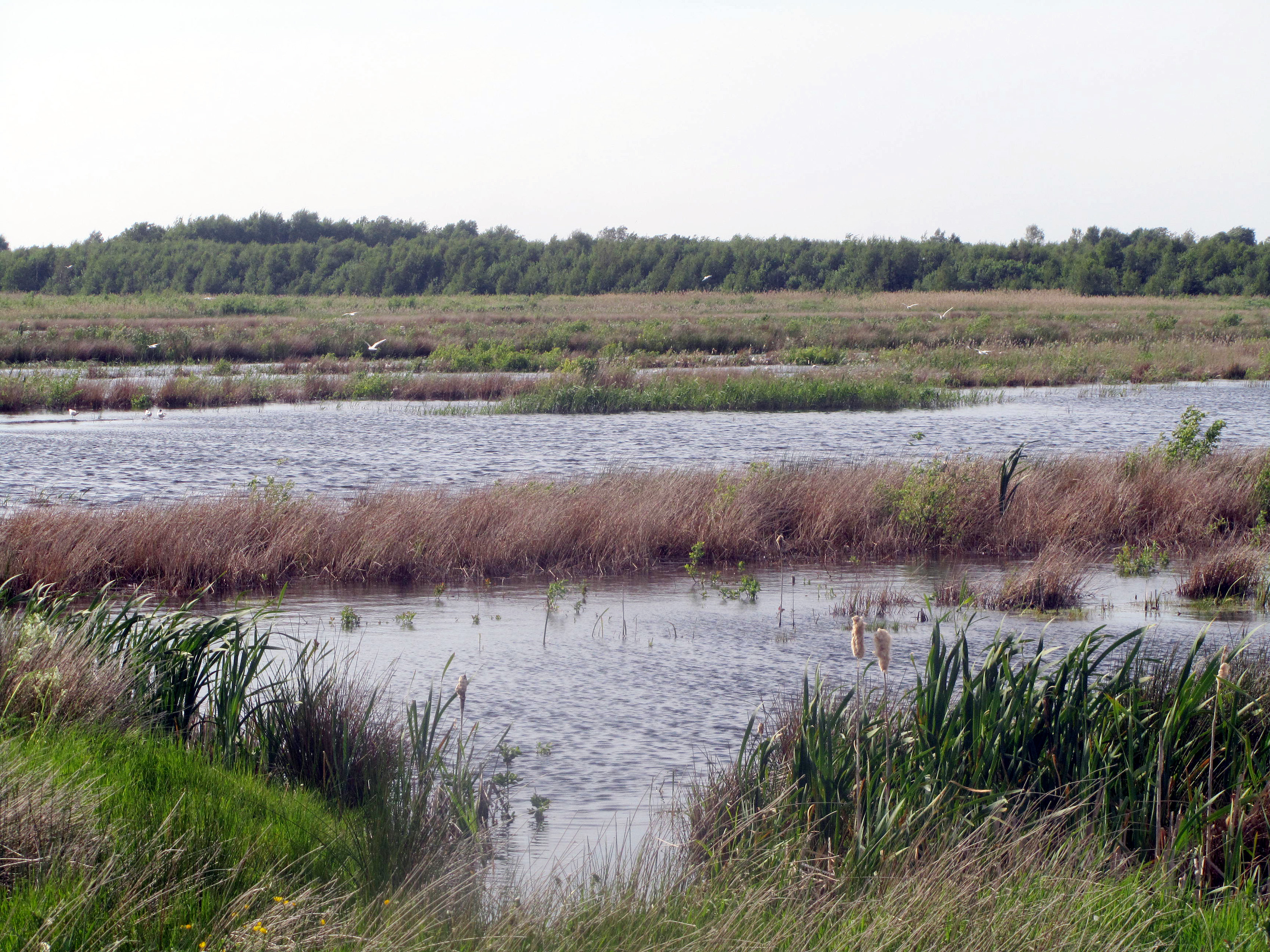 Portlandmosen i Lille Vildmose